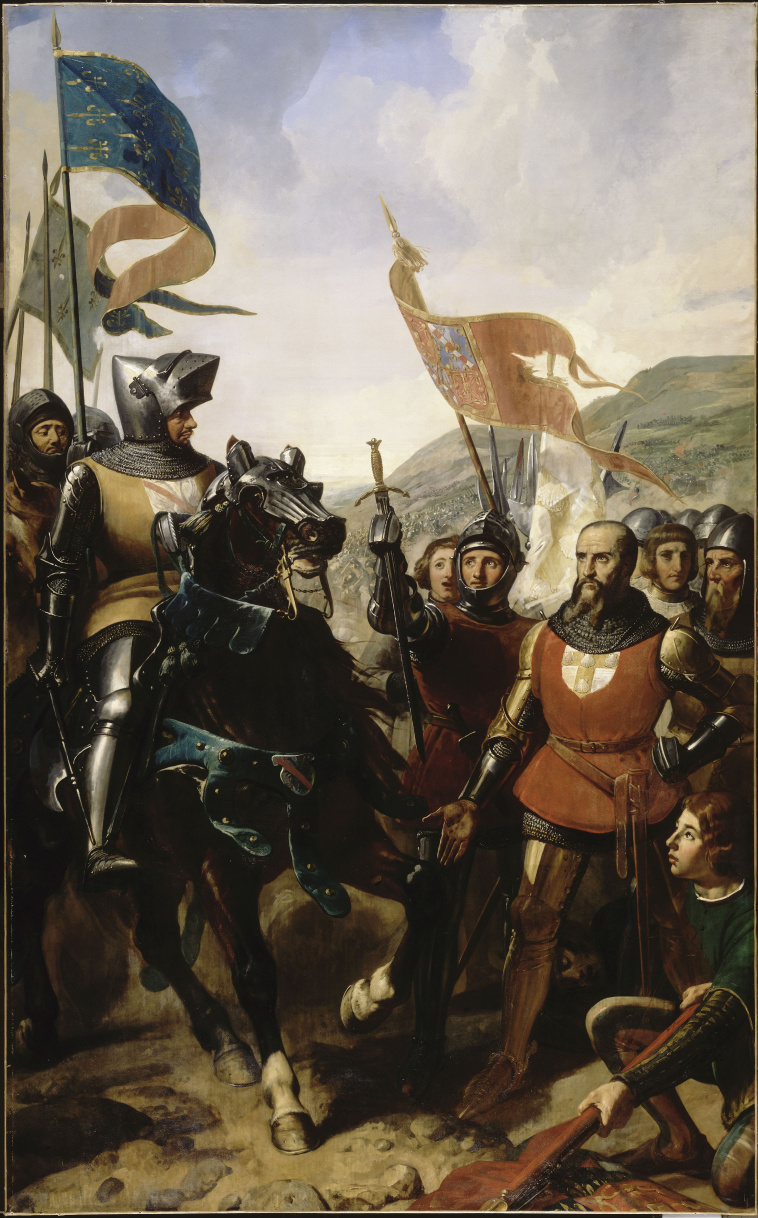 domaine public